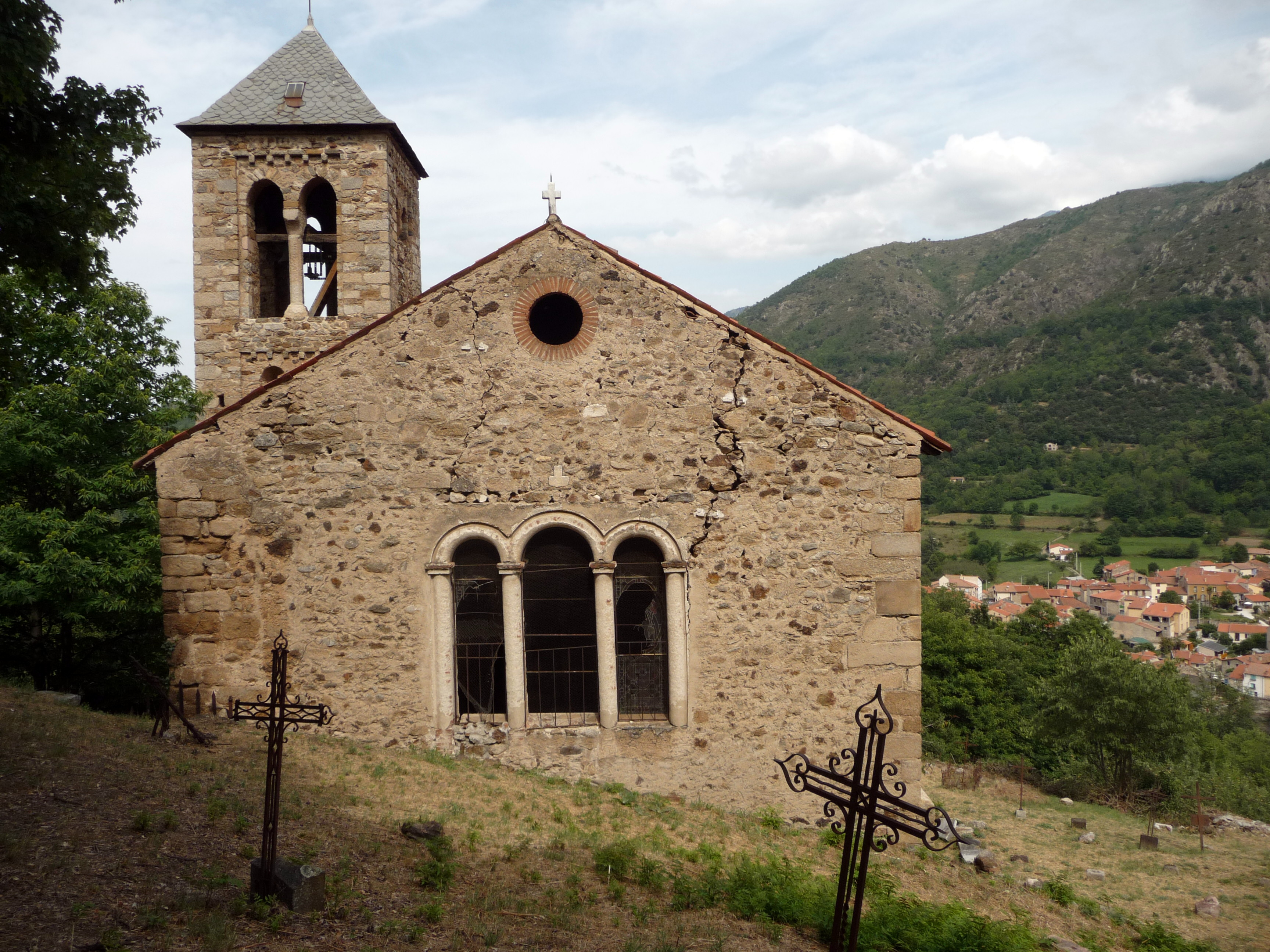 Sant Esteve de Saorra al Conflent, finestra trigeminada.